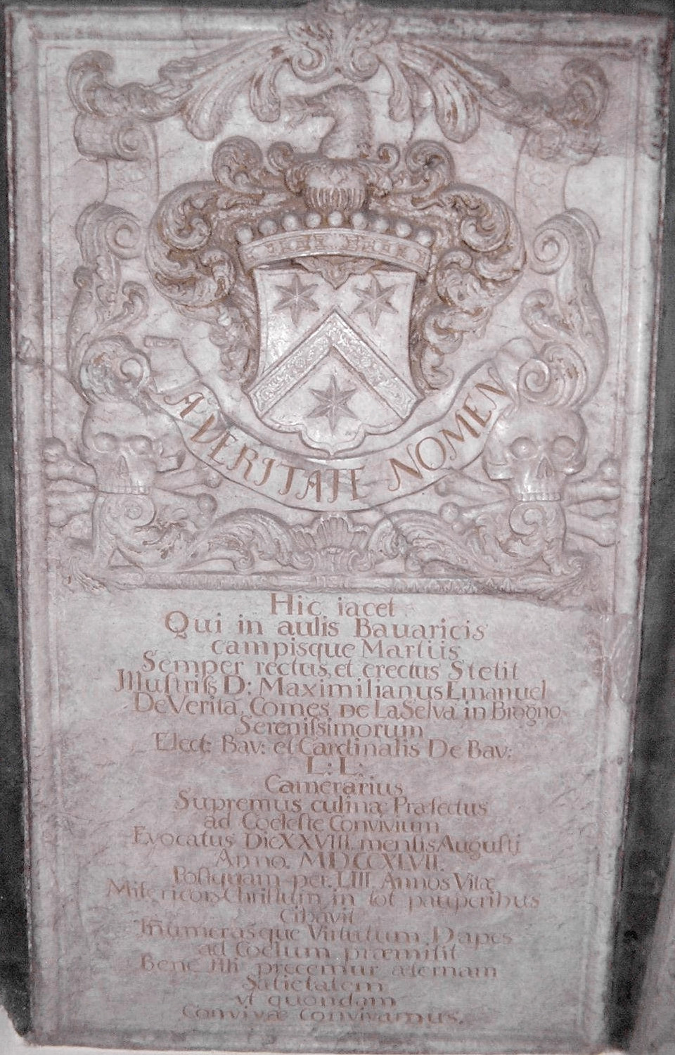 Epitaph für Maximilian Emanuel de Veritá, Graf de la Selva in Brogno, gestorben am 28. August 1747. Der Epitaph besteht aus graurotem Marmor und befindet sich in St. Benedikt, Kirche in Odelzhausen